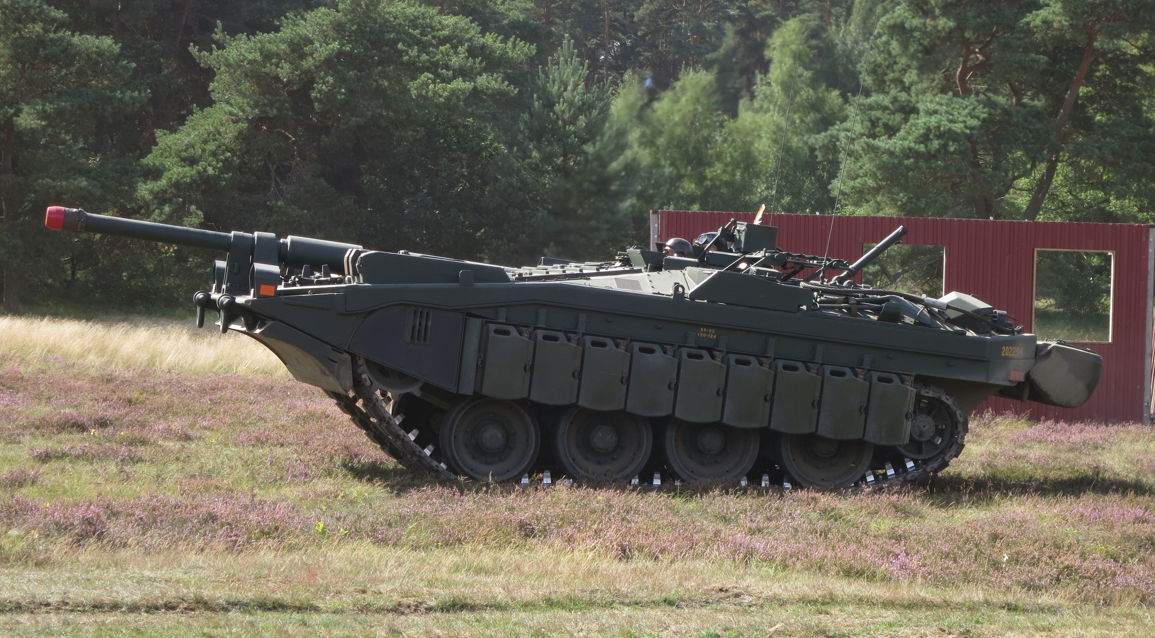 Bakåtlutad Stridsvagn 103 (Stridsvagn S) vid Regementets Dag på P7 Revingehed